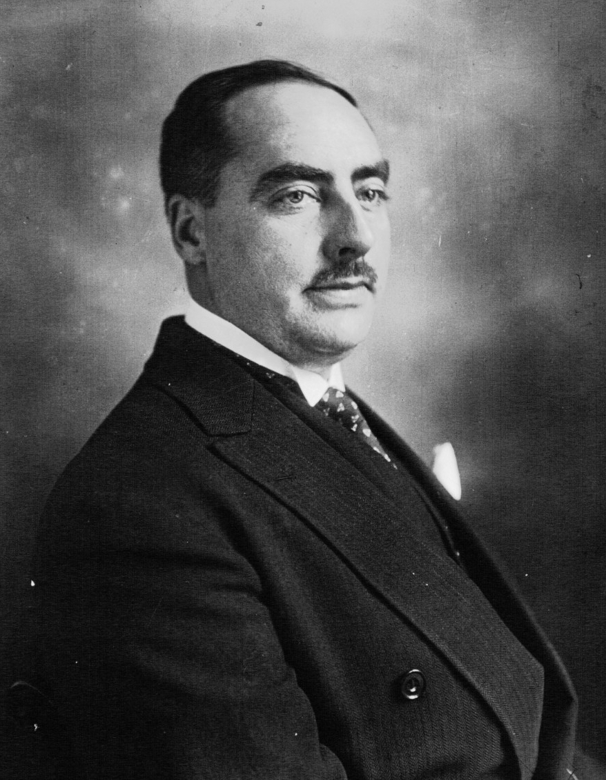 Pierre Taittinger, député de Paris [photographie de presse]